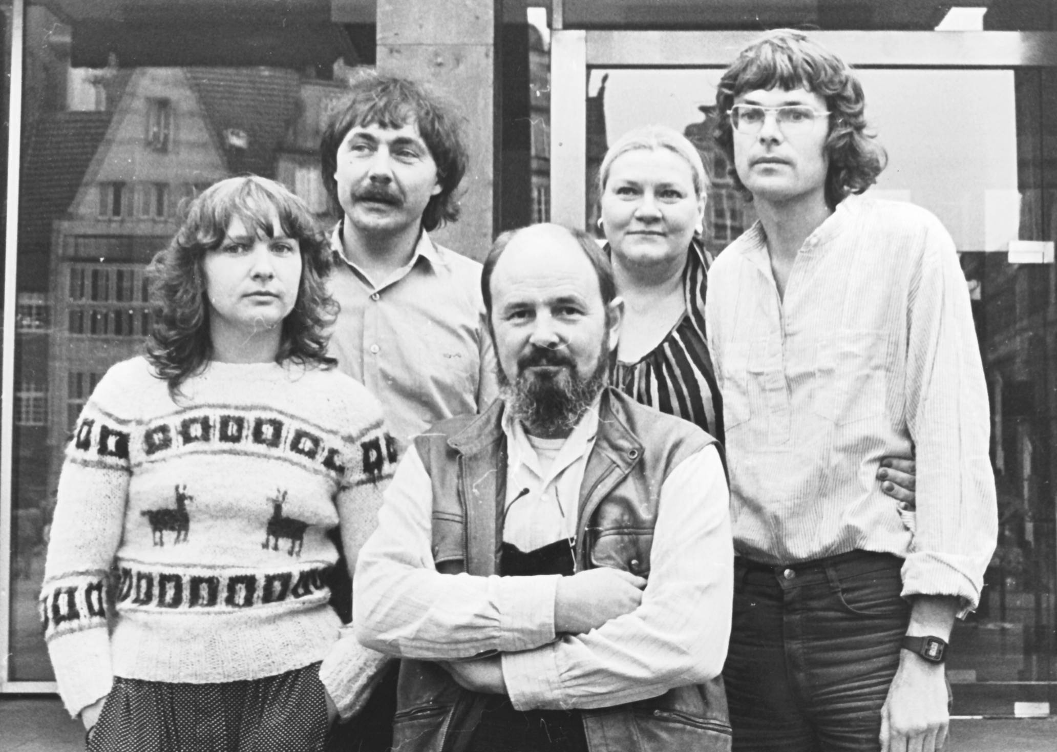 Grüne Bürgerschaftsfraktion Bremen 1985 v. l. Christiane Bodammer, Hans-Peter Wierk, Peter Willers, Christine Bernbacher, Dieter Mützelburg